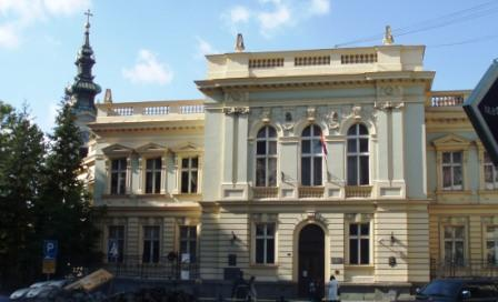 Душан Ј. Басић:Школа код саборне цркве у Београду у којој је службовао Д.Ј.Путниковић